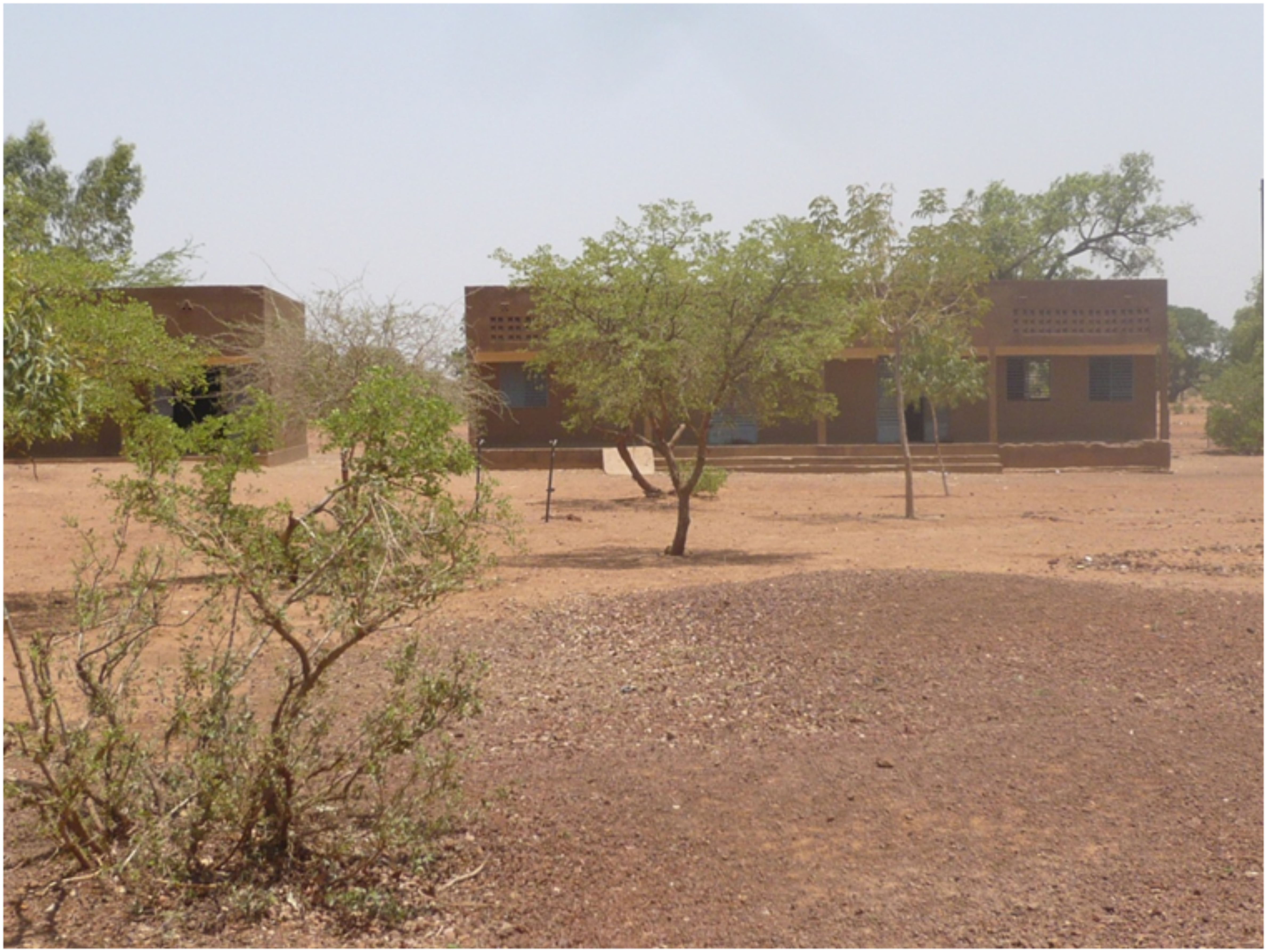 Bâtiment scolaire de l'école primaire de Darbiti 1